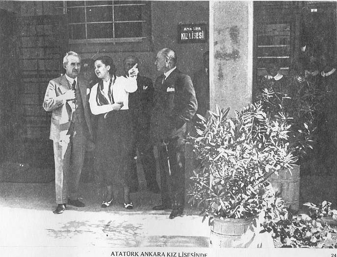 İsmet (İnönü), Afet (İnan), and Mustafa Kemal (Atatürk), during a visit to the Ankara High School for Girls, May 12, 1934.